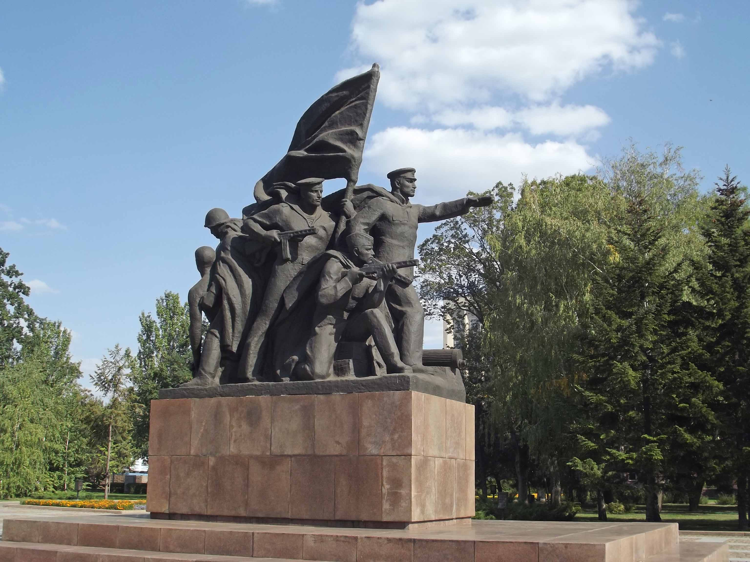 Памятник десанту Ольшанского